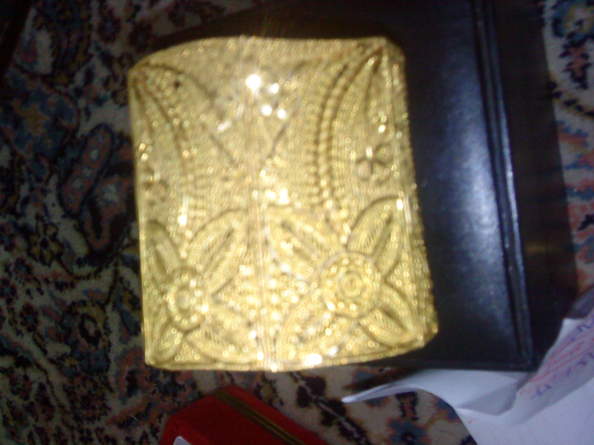 دستبند طلا یا چوری طلا زنان بلوچ